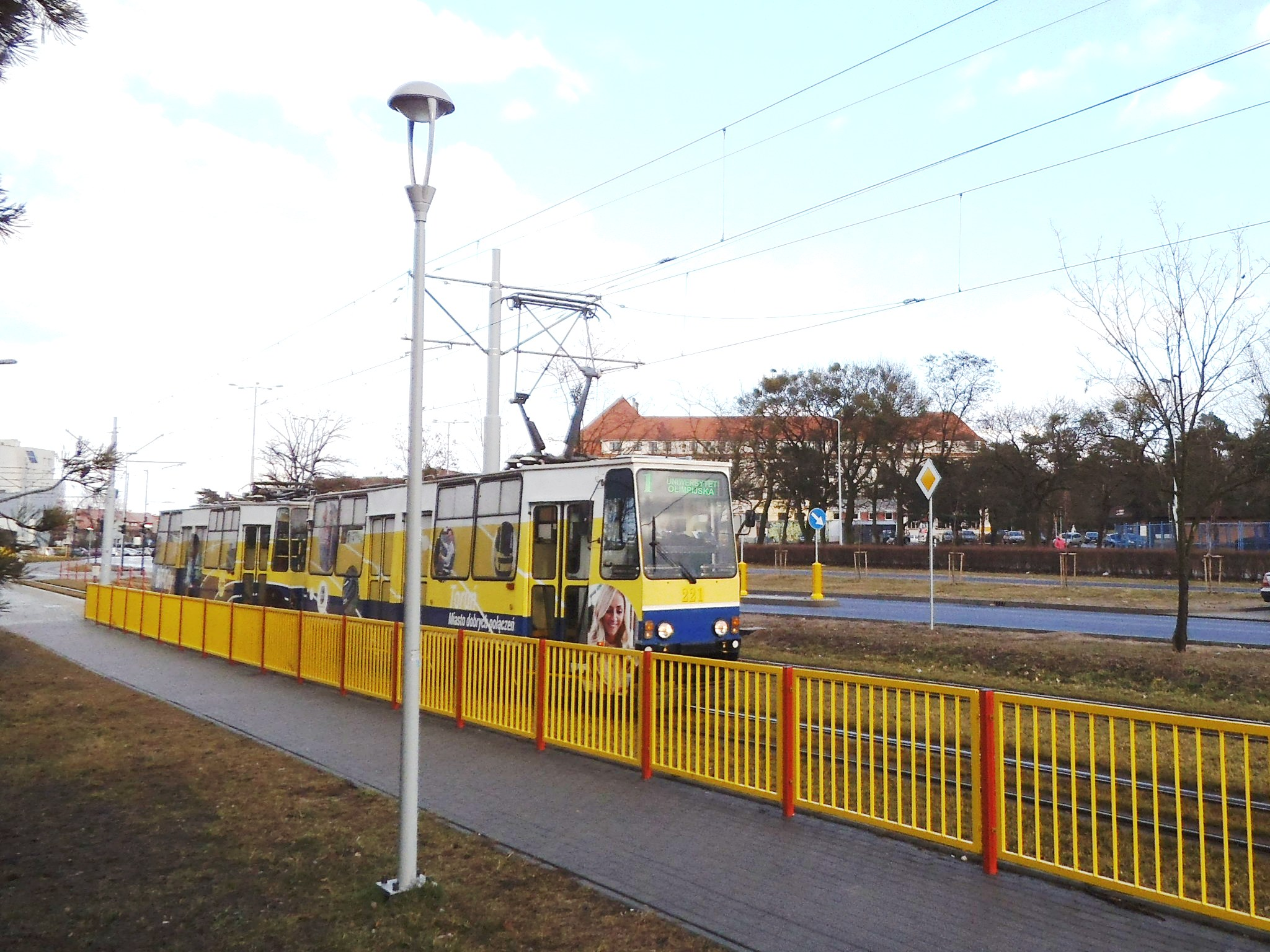 Linia na bielany w Toruniu